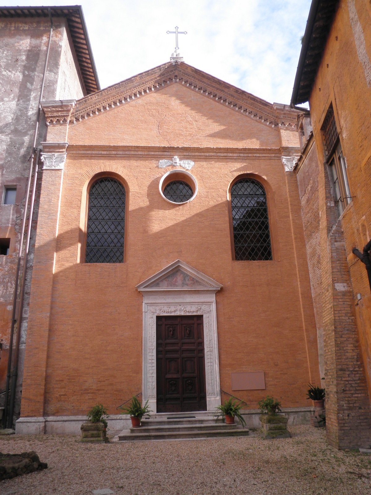 Roma, san Cosimato. Cortile verso la piazza. Chiesa (oggi camera mortuaria).